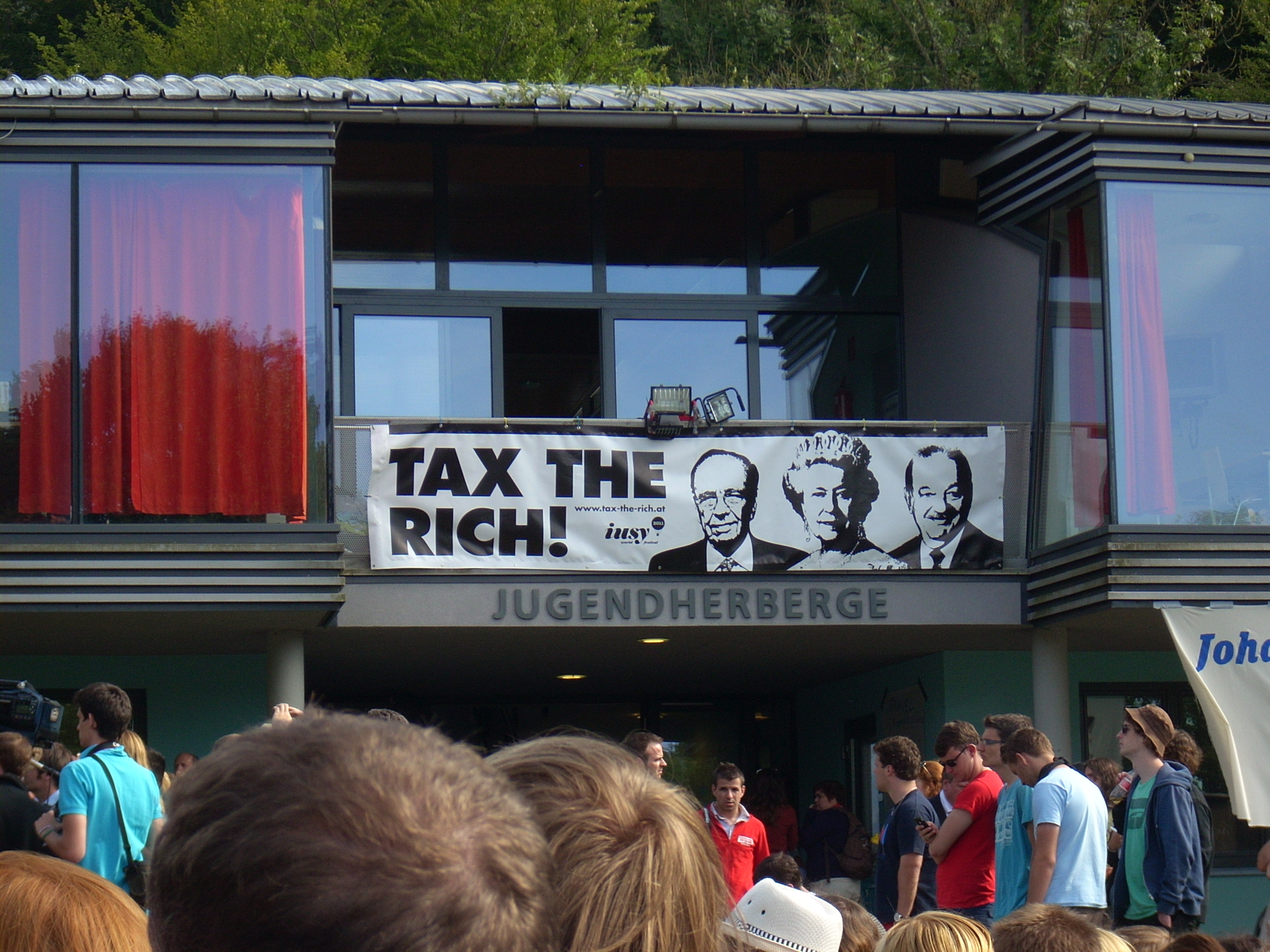 Banner einer IUSY-Kampagne für die Finanztransaktionssteuer